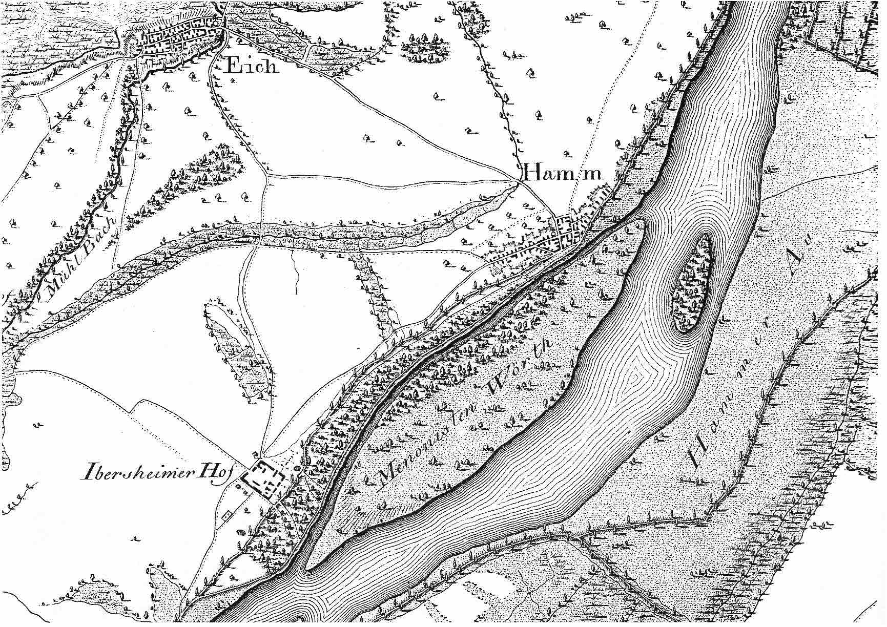 Johann Heinrich Haaß (1758-1810) aus: Militärische Situationskarte, Darmstadt 1799, Detail Menonisten Wörth